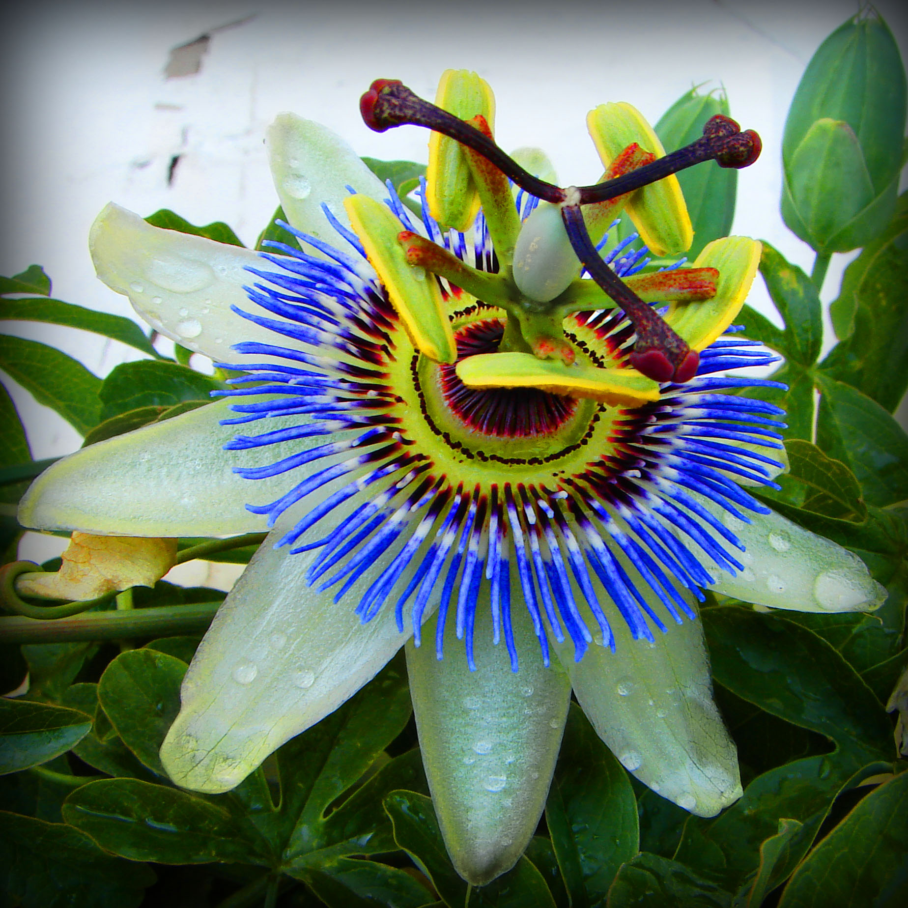 Fleur de "Passiflora caerulea